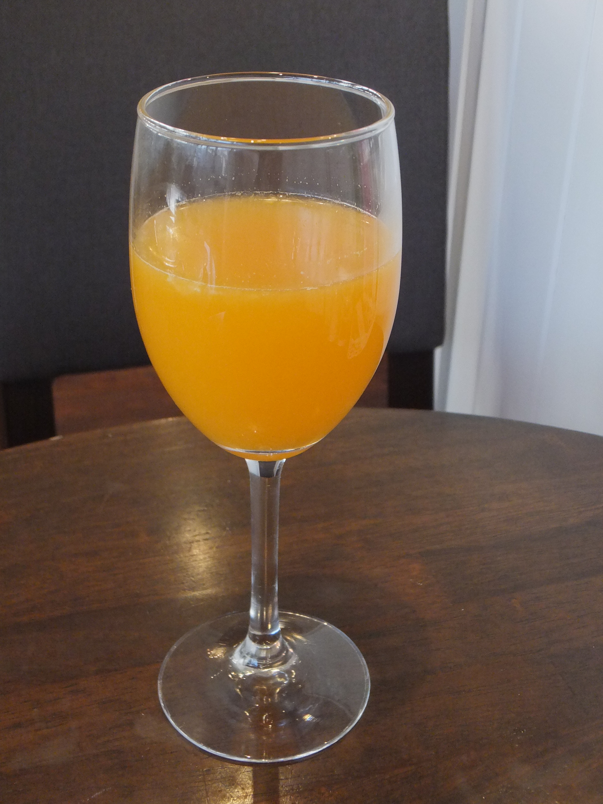 オレンジジュース